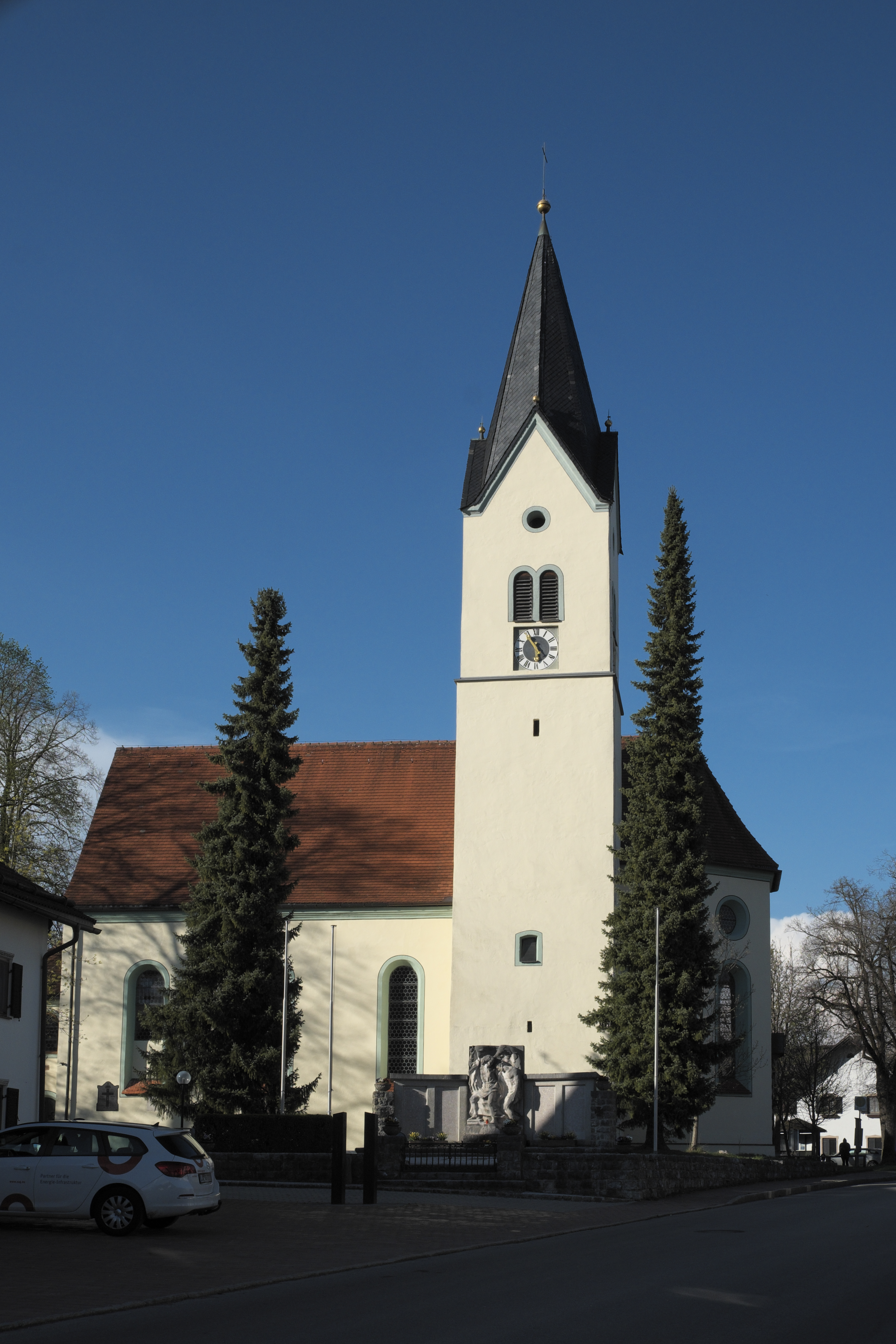 Katholische Pfarrkirche St. Georg in Sindelsdorf im Landkreis Weilheim-Schongau (Bayern/Deutschland)